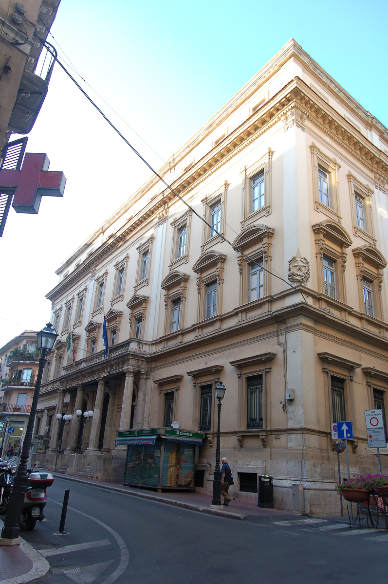 Chieti City 2011